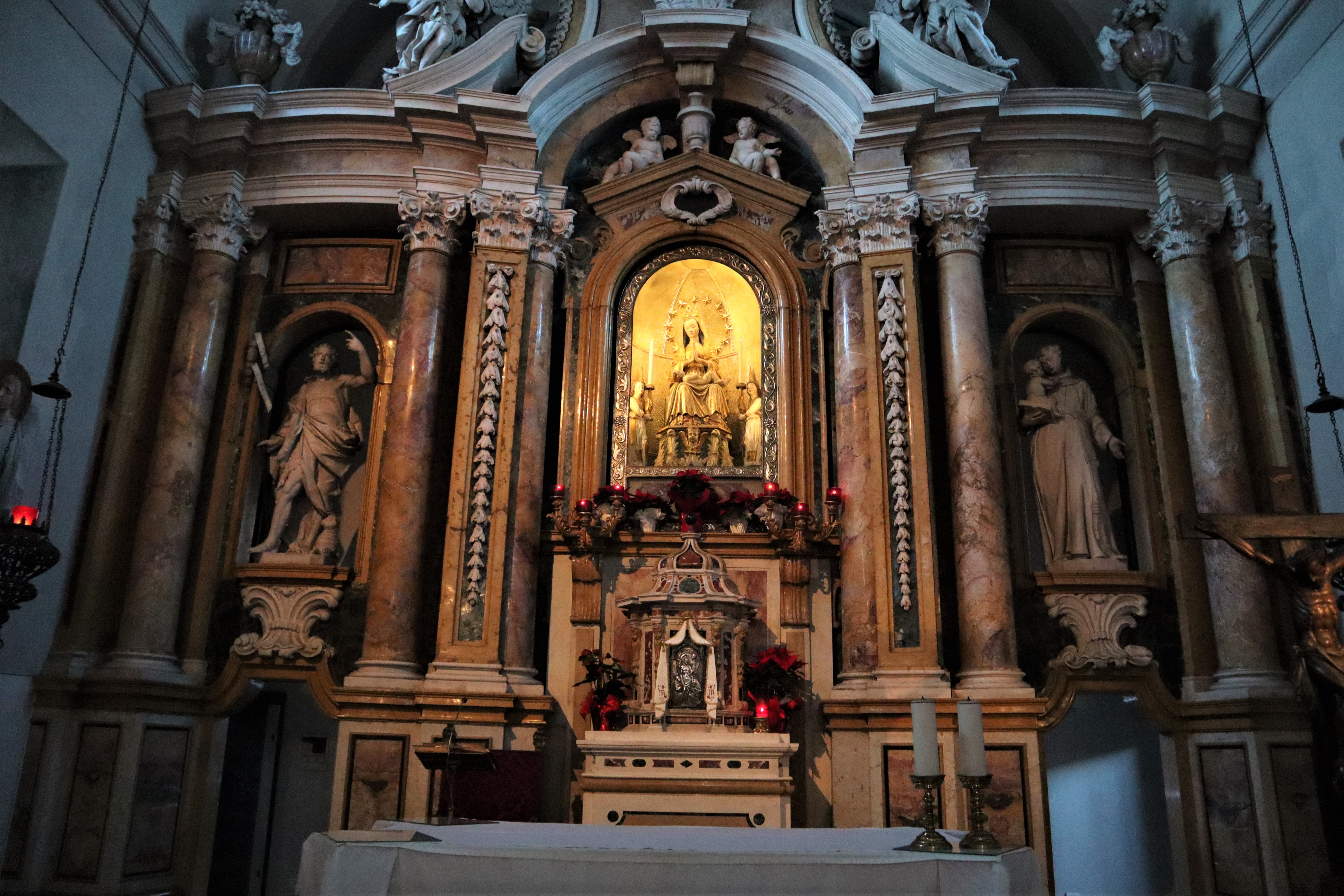 Santuario della Madonna delle Grazie, Arco.